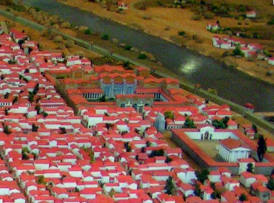 Augusta Treverorum. Barbarathermen im Modell des Römischen Trier ca. 360/370 n. Chr. im Rheinischen Landesmuseum Trier gebaut von Joachim Woditsch, Trier